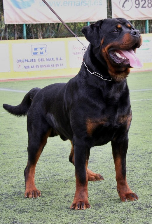 I Exposición Monográfica Club Rottweiler de España - Santa Brigida - Gran Canaria.